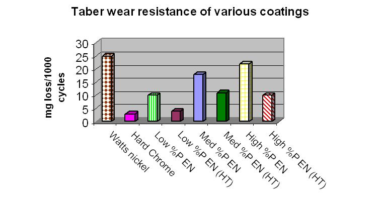 schéma electroless nickel